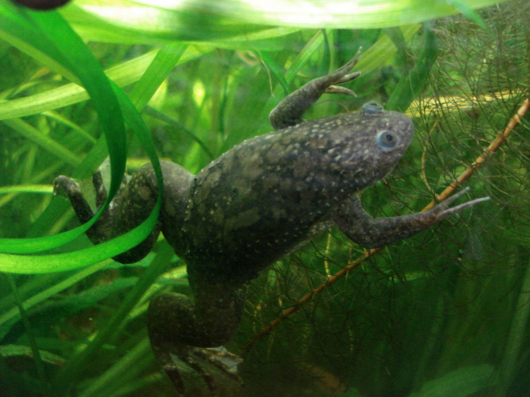 Xenopus laevis